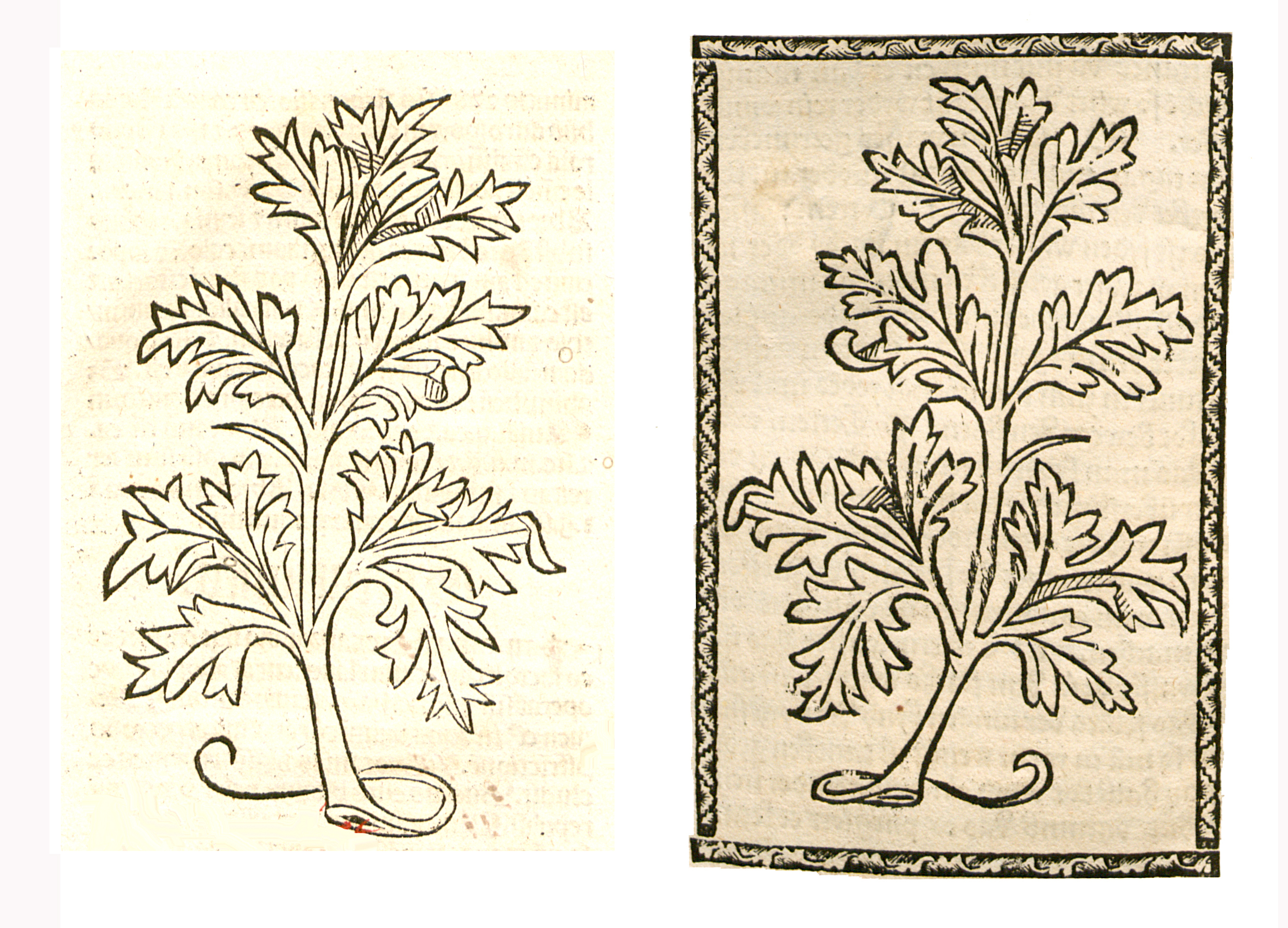 Abbildung von Wermut (Artemisia absinthium)